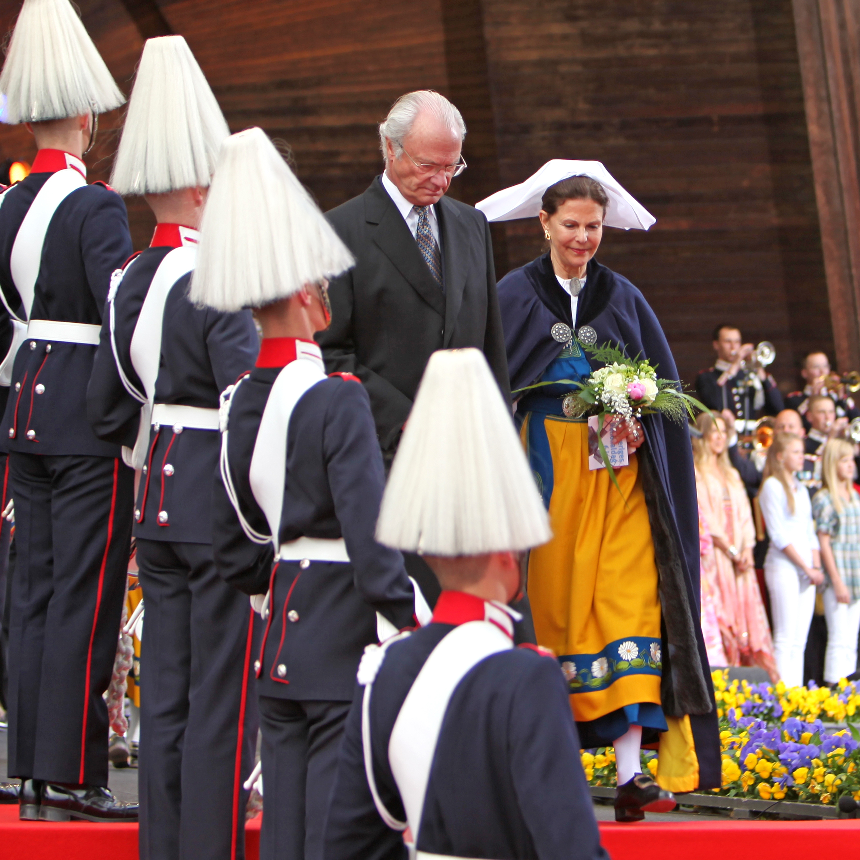 Carl XVI Gustaf och drottning Silvia under nationaldagsfirandet på Skansen 2009.